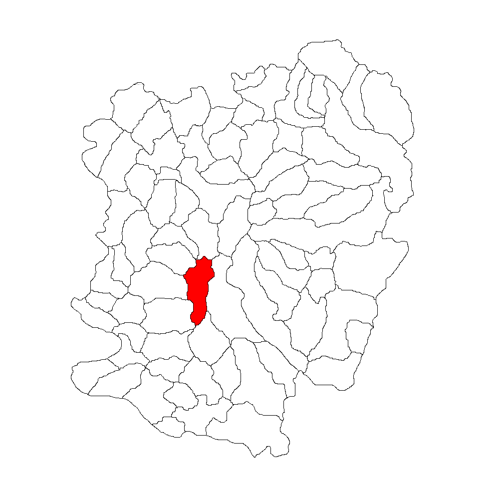 Categorie:Hărţi ale judeţului Caraş-Severin